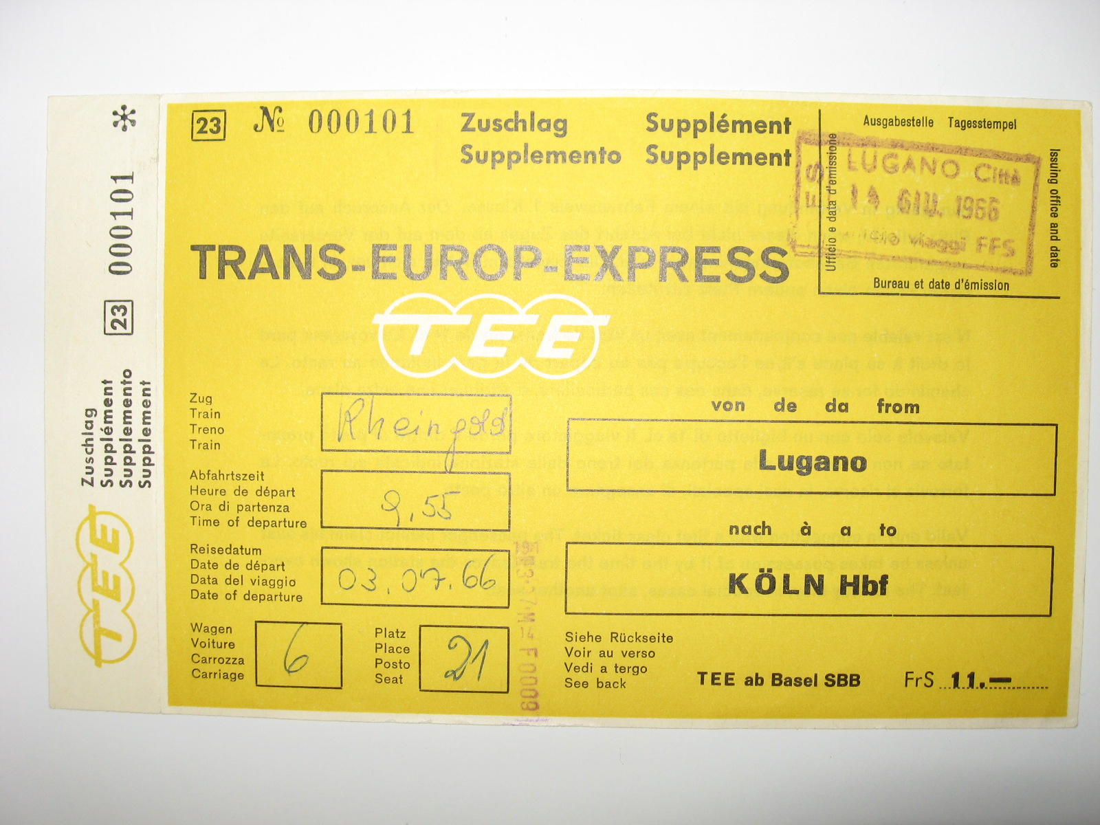 Biglietto del treno TEE Rheingold